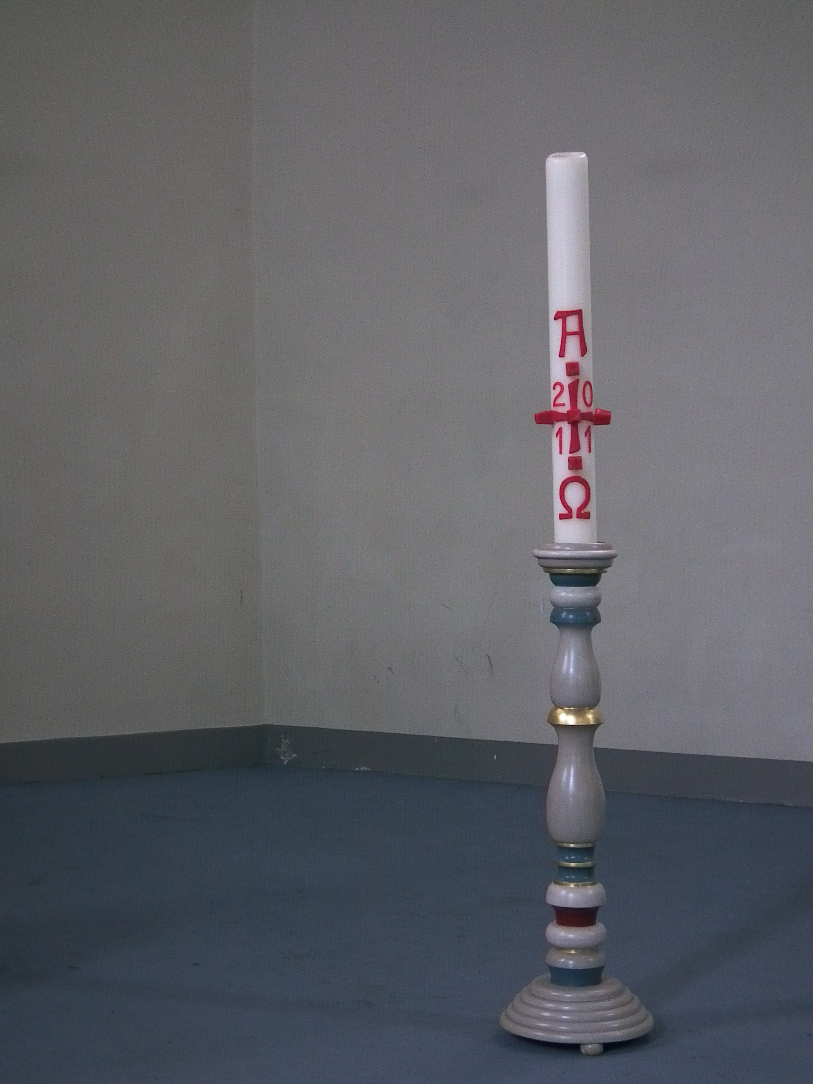 Providenzkirche in Heidelberg (Baden-Württemberg, Deutschland)